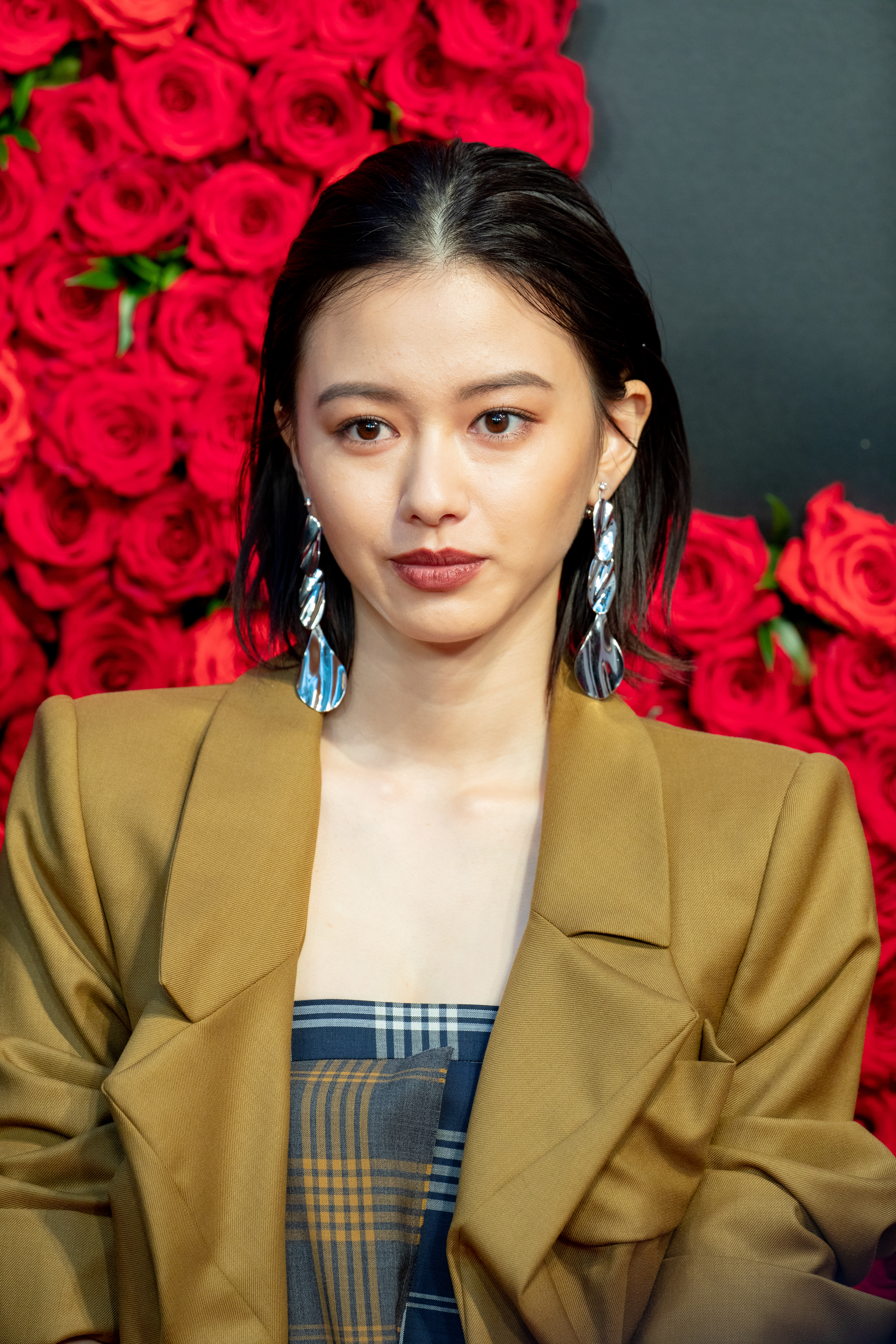 第30回 東京国際映画祭 オープニングセレモニー 山本舞香 (ギャングース)